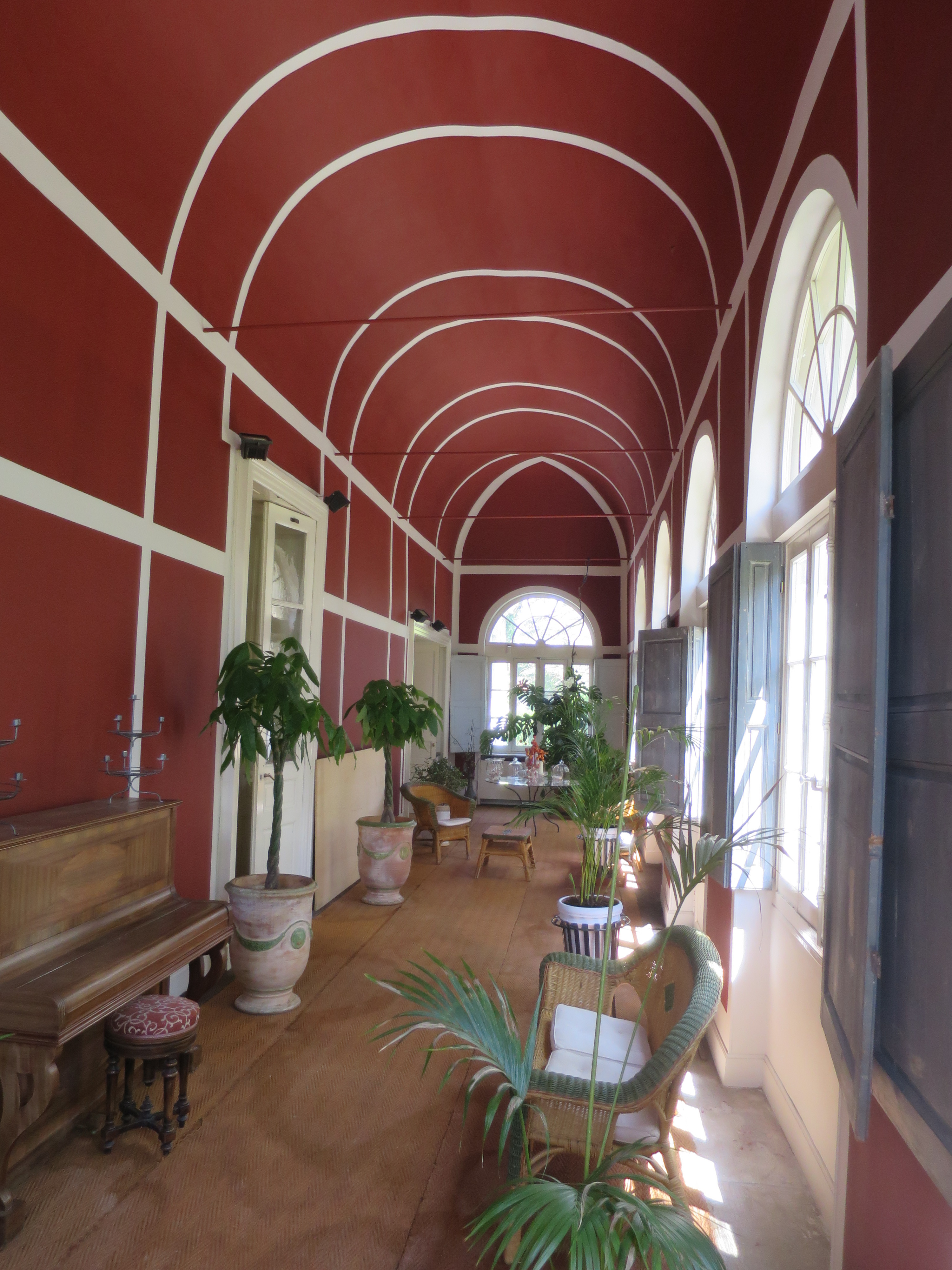 Villa Lebrun, Marssac-sur-Tarn, Galerie